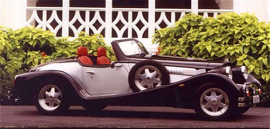 A Bufori auto